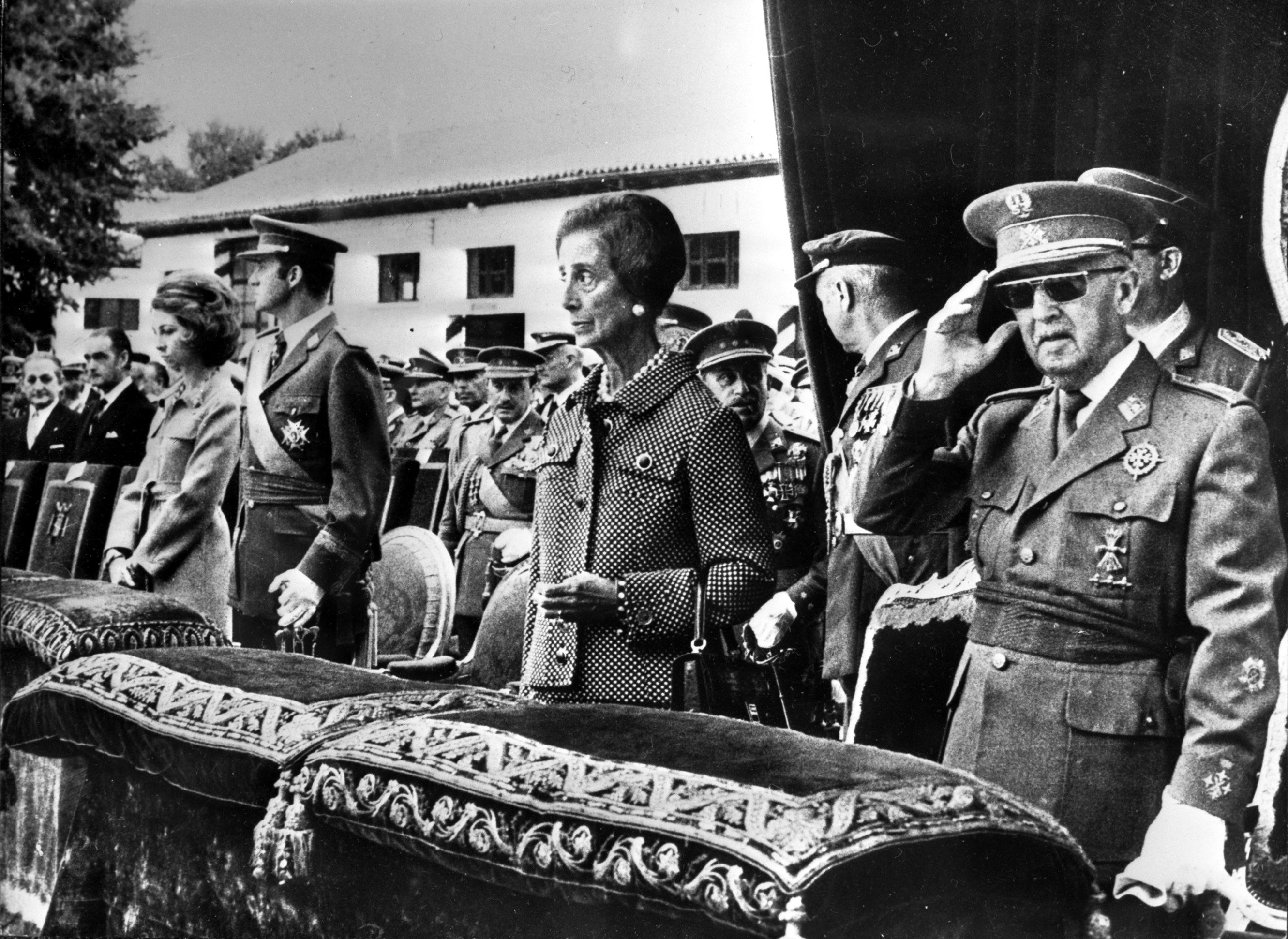 Franco met vrouw Dona Carmen Polo (rechts) links opvolger Prins Juan Carlos met Sophia van Griekenland